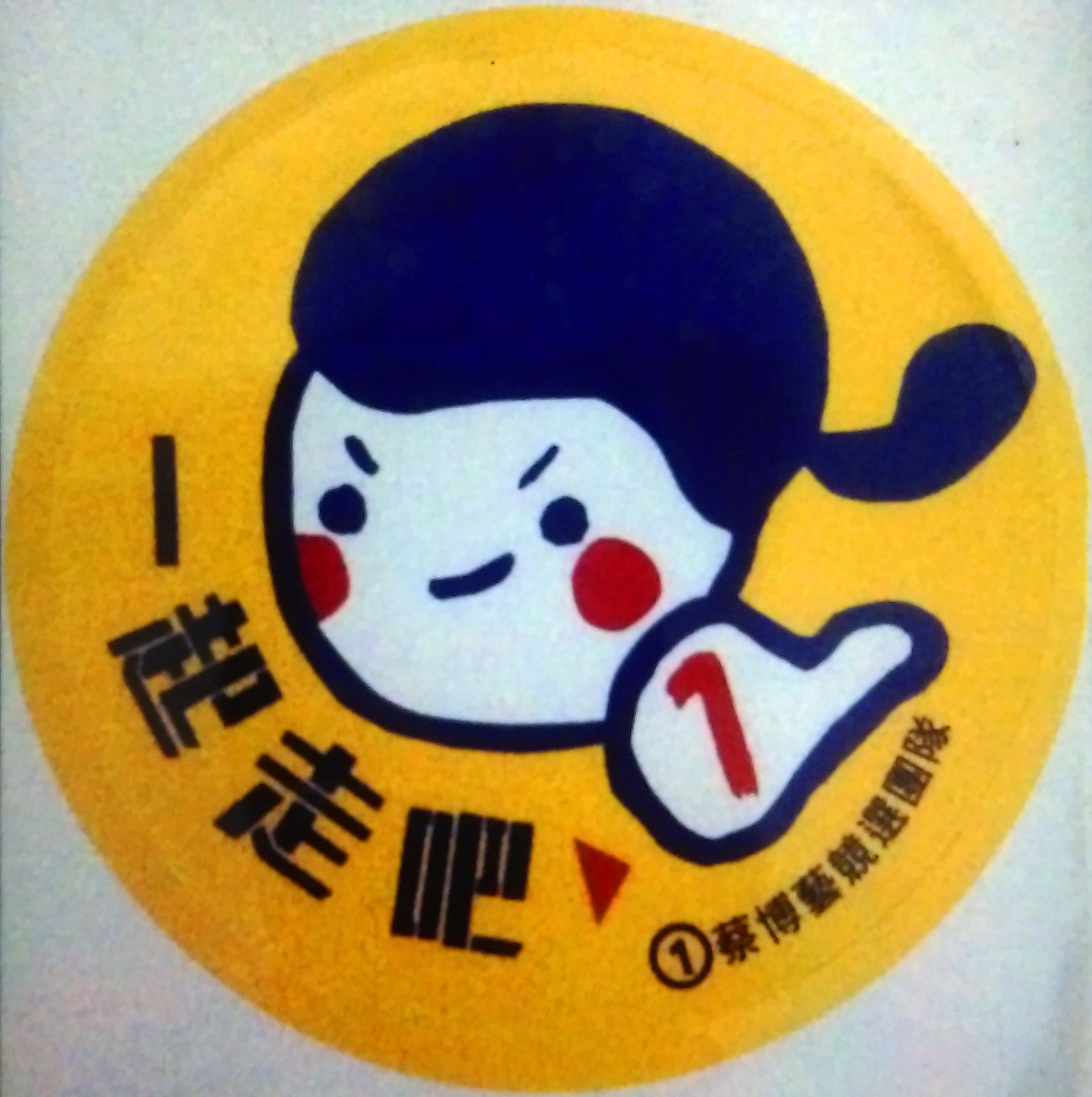 中文（中国大陆）: 2014年淡江大学学生会正副会长补选，蔡博艺竞选团队文宣。